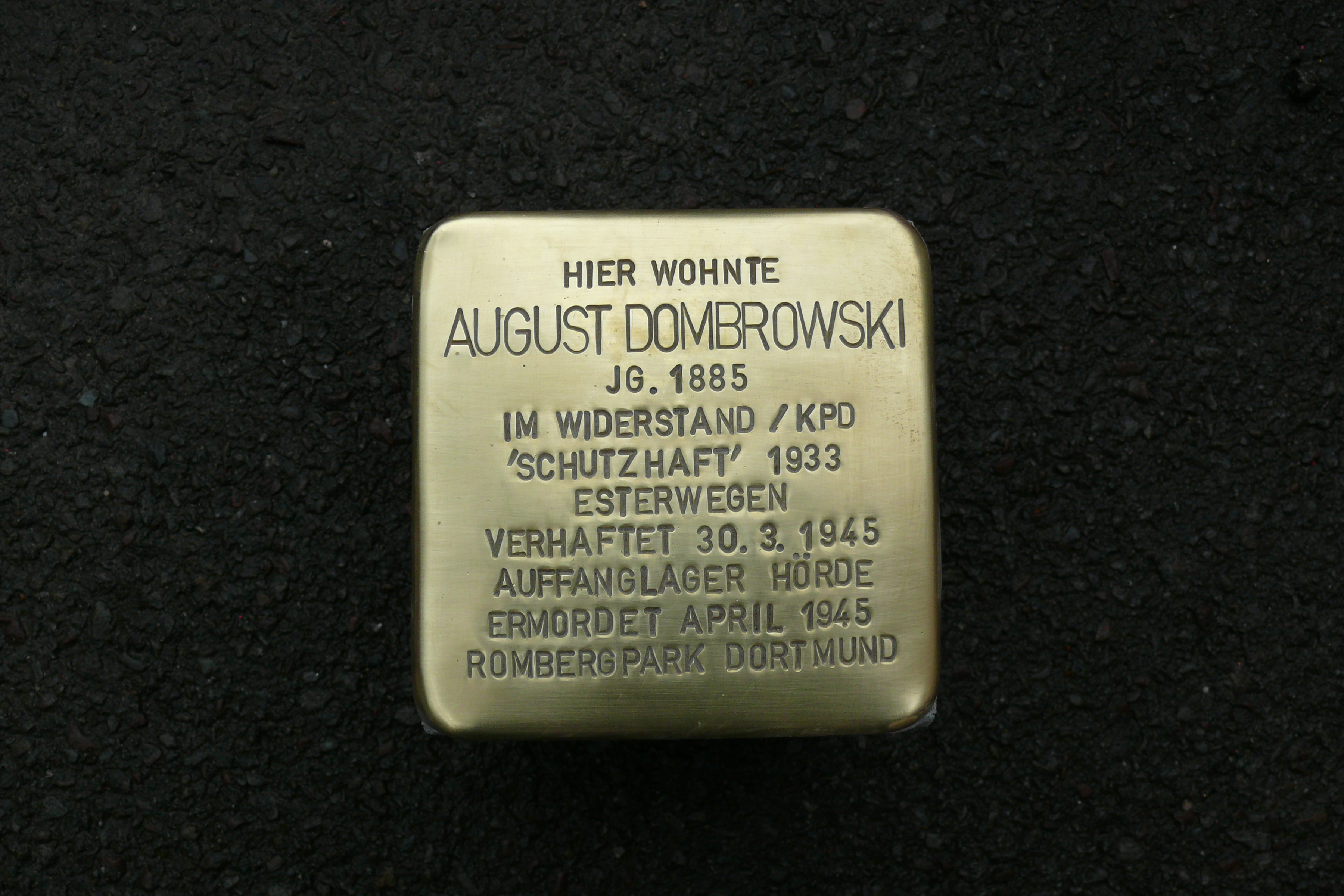 August Dombrowski, 2019